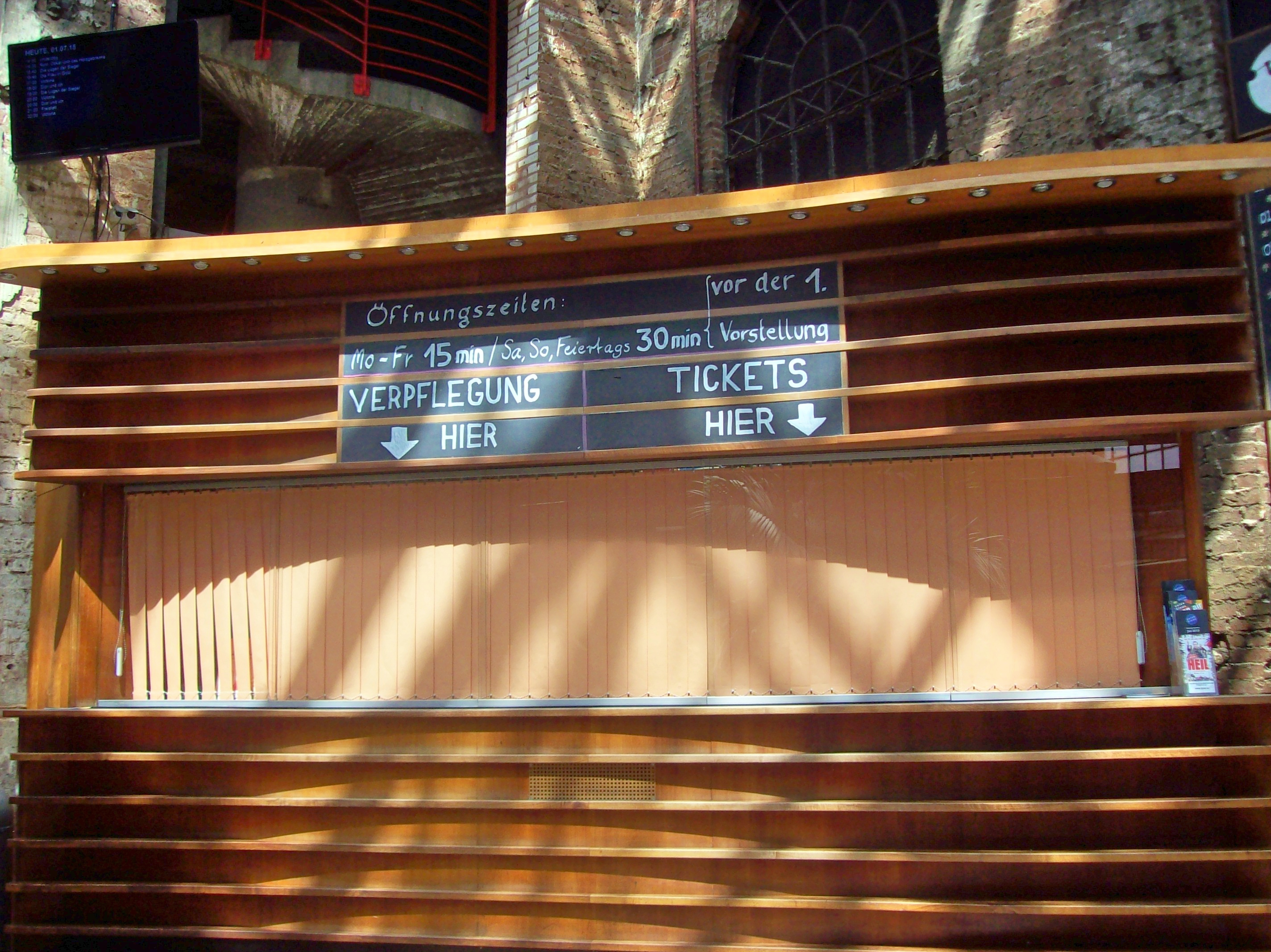 Die Zeise-Hallen in der Friedensallee 9 im Stadtteil Ottensen. Benannt nach der ehemaligen Schiffsschraubenfabrik Zeise, die hier seit 1883 bis 1979 ihre Werkhallen hatten. Danach standen die Hallen lange leer und werden heute als Kultur-Zentrum genutzt. Bekannt ist das Zeise-Kino, es gibt ein Restaurant, eine Jugend-Bücherei und verschiedene kleine Läden. Die Kino-Kasse.This is a photograph of an architectural monument.